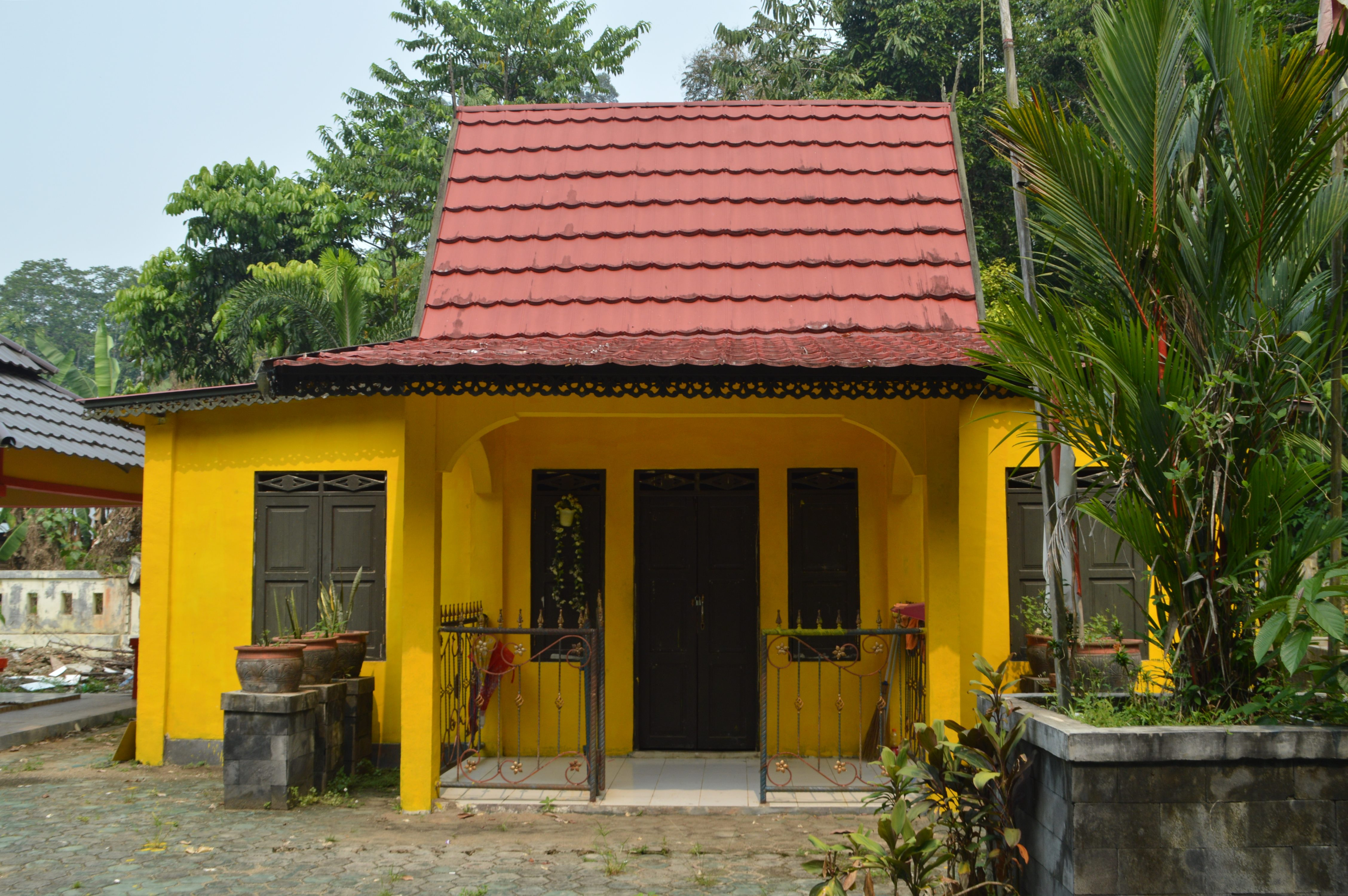 Makam Putri Mayang Sari di desa Jaar, Kabupaten Barito Timur, Kalimantan Tengah.